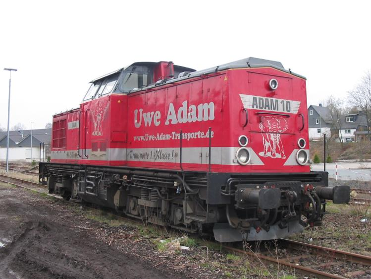 Lokomotive Adam 10 ("Anja") der Firma Uwe Adam. Es handelt sich um die ehemalige 202 743 der DB. Fotograf oder Zeichner: Alwin "echoray" Meschede